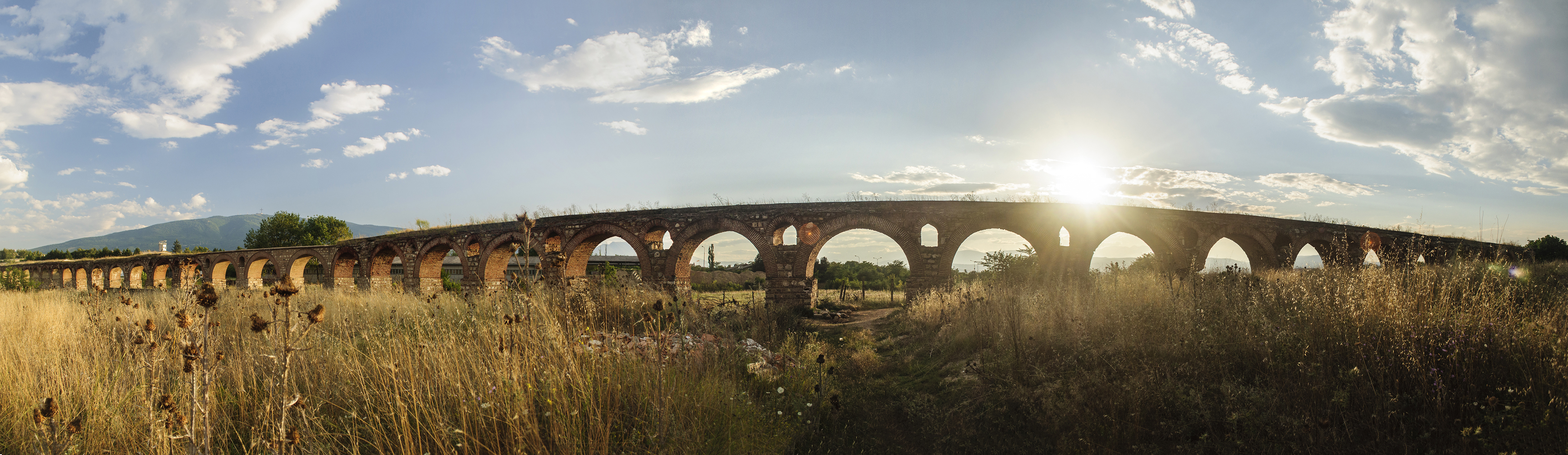 Скопскиот аквадукт претставува археолошки локалитет кој се наоѓа кај Визбегово, во непосредна близина на градот Скопје, во Република Македонија. Датумот на неговата изградба до скоро не бил познат. Се сметало дека тој датира од времето на Римската империја или Византија.[1], во времето на Јустинијан I, од 527 - 554 година, па поради тоа овој аквадукт се нарекува и Јустинијанов аквадукт. Според овие мислења тој бил поврзан со градот Скупи. Се смета дека преку аквадуктот била спроведувана вода од изворот Лавовец во селото Глуво на Скопска Црна Гора, до "топџиската касарна", Мустафа-пашината џамија, до некогашниот турски уќумат, Куршумли -ан и Сија-беговата џамија